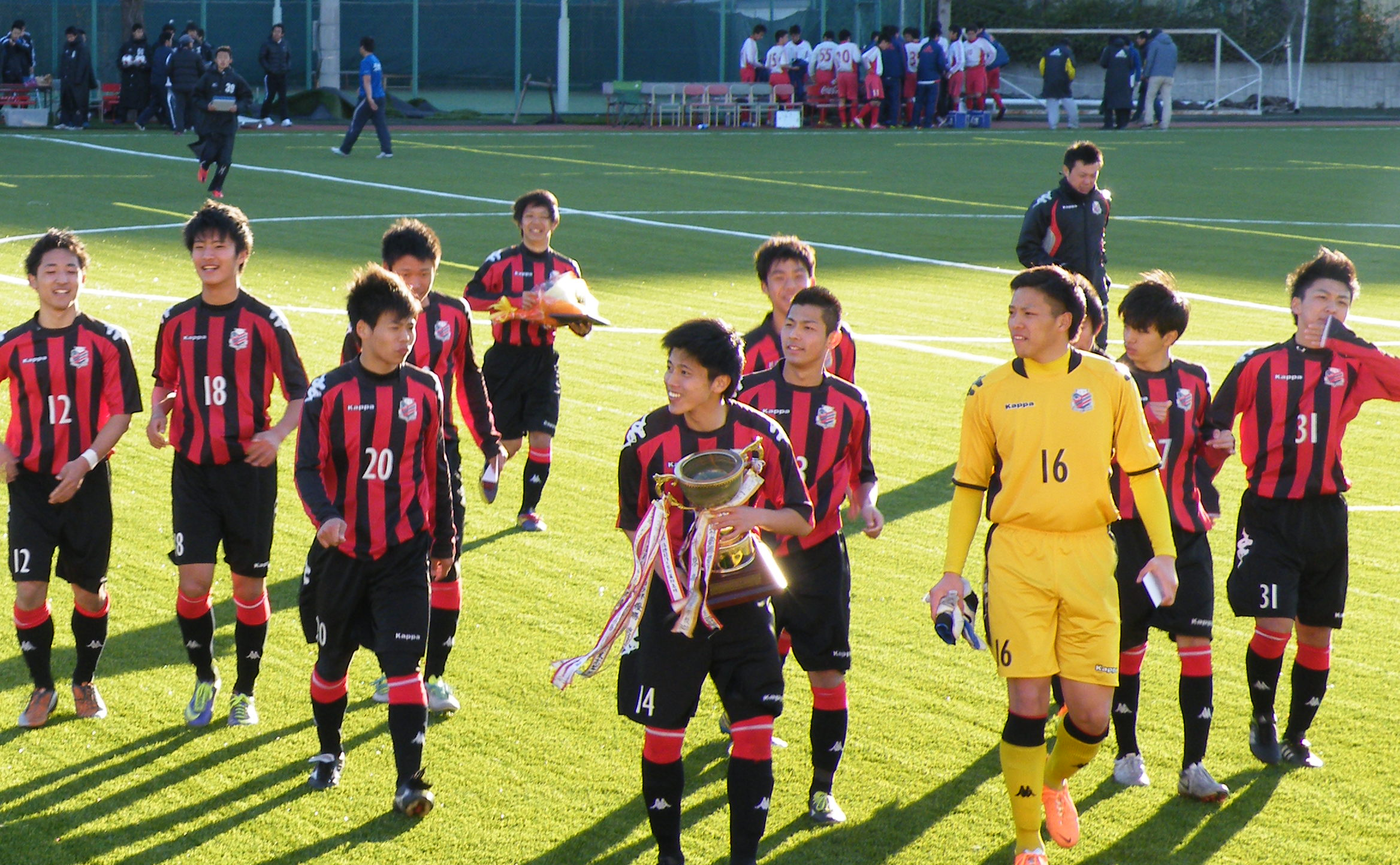 第24回 国際親善ユースサッカー大会 “イギョラカップ” で優勝した、コンサドーレ札幌U-18の選手たち